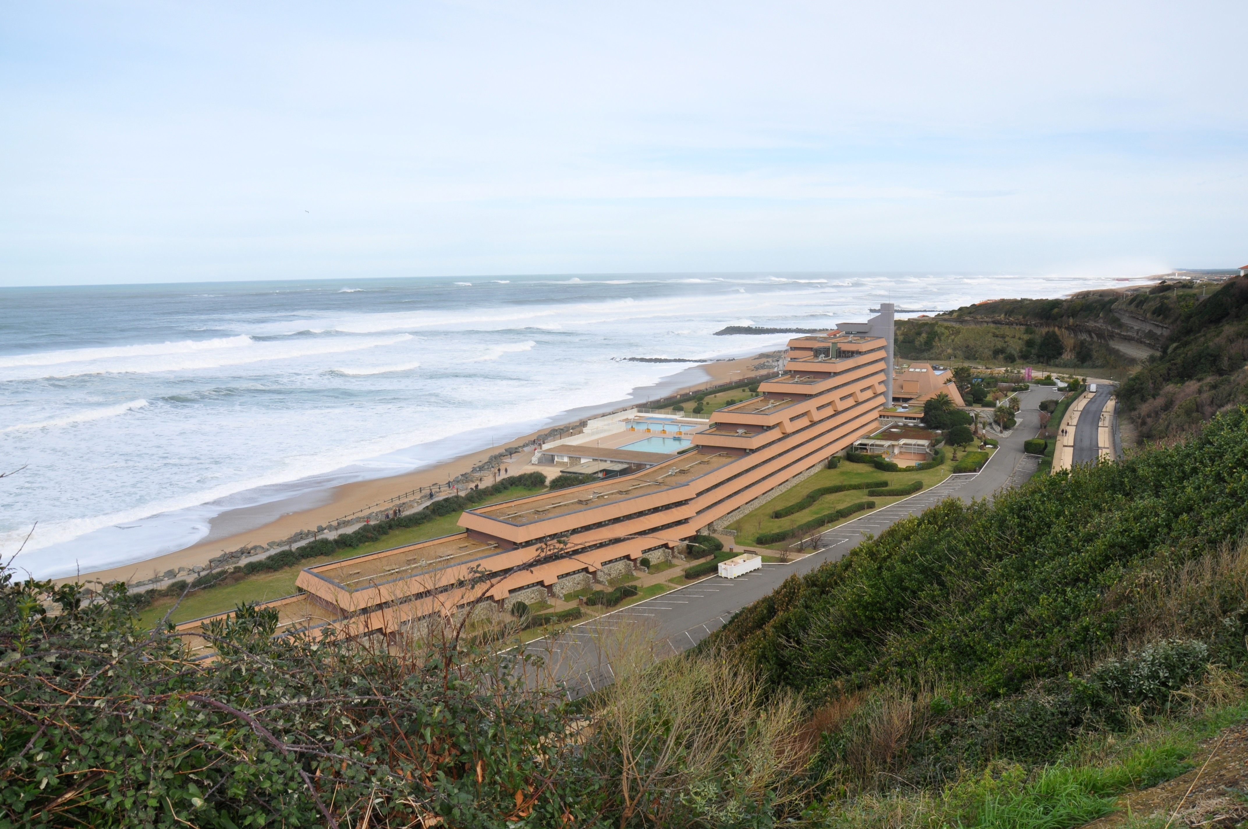 ANGLET CHAMBRE D'AMOUR